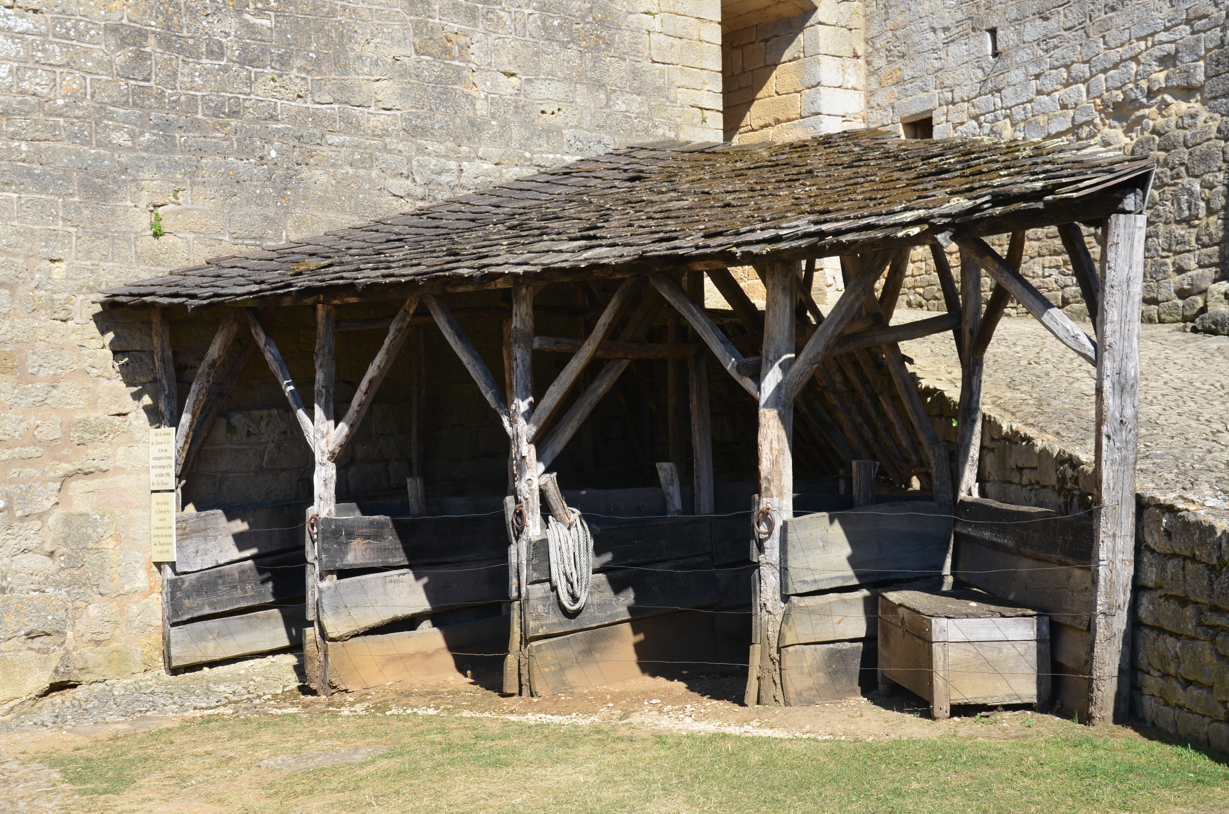 Ces écuries reconstituées ont servi de décor au film Jeanne d'Arc (1999) de Luc Besson.